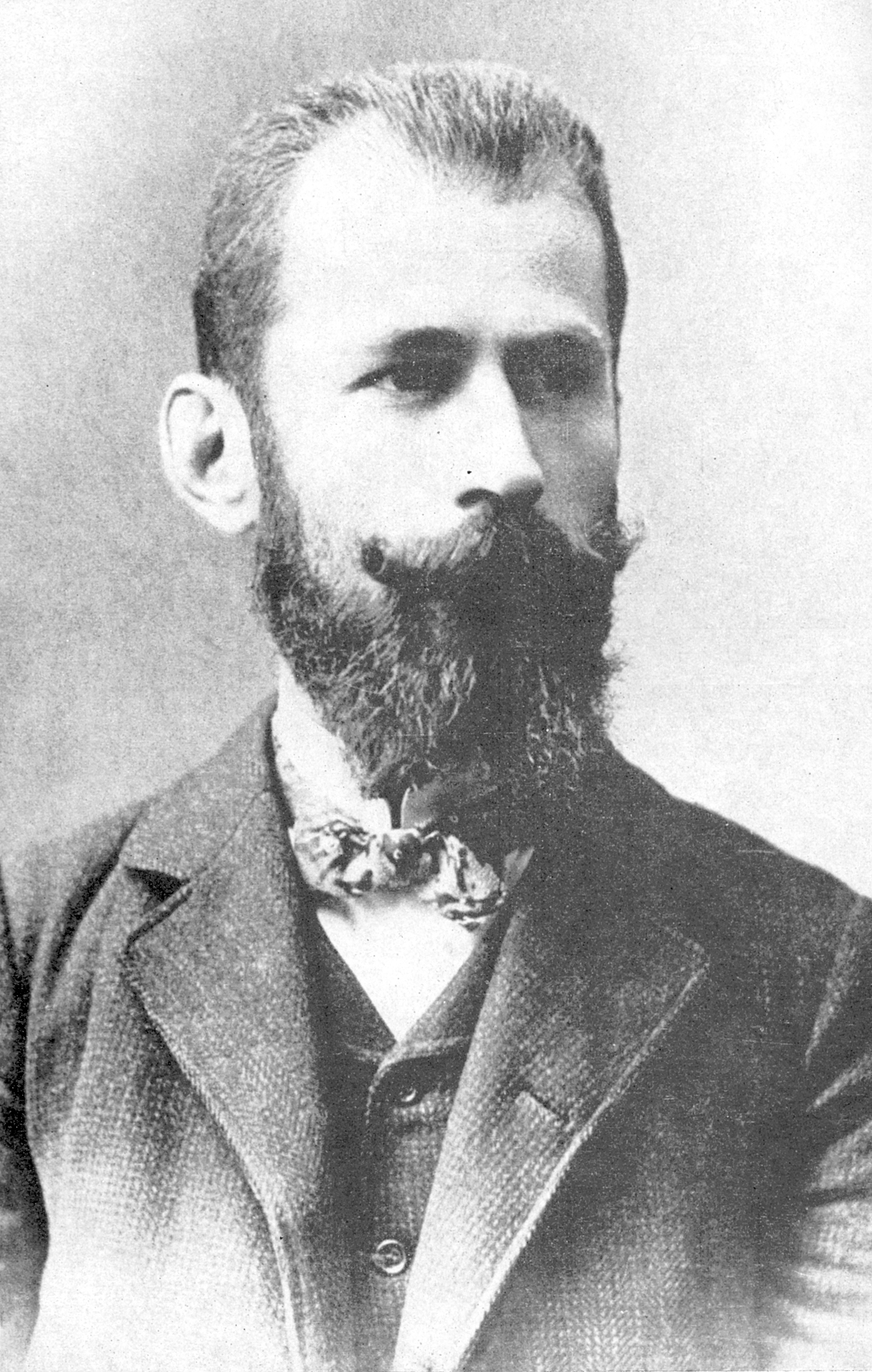 Даме Груев (1871-1906)